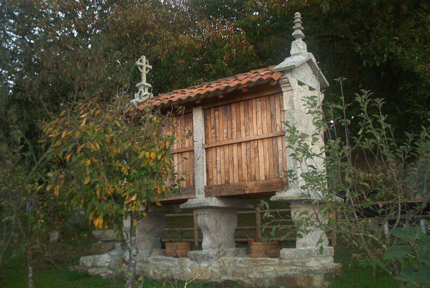 Hórreo en Vilane (Antas de Ulla)